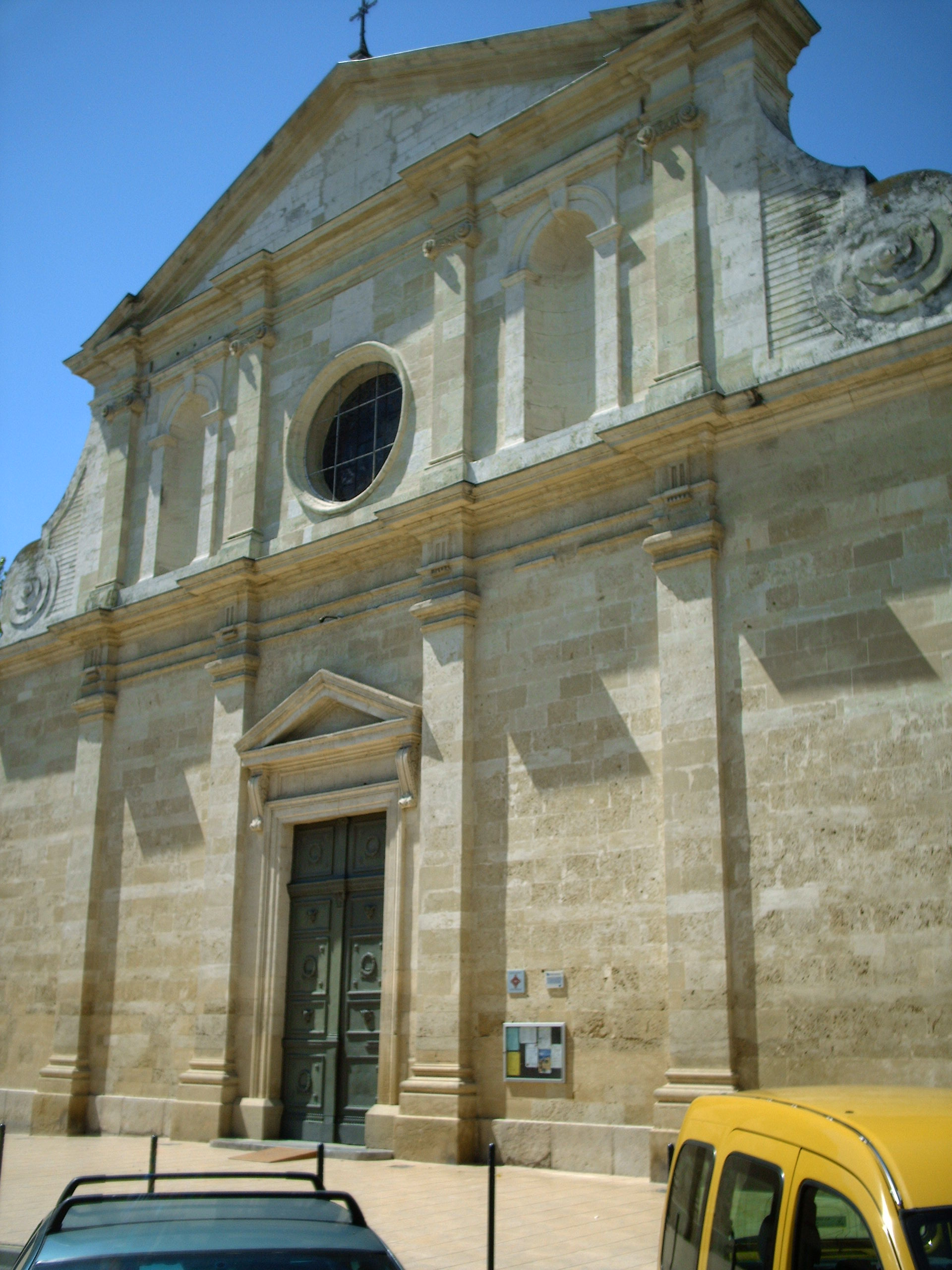 Église Notre-Dame-du-Lac de Lunel (Hérault); façade classique fin 17ème par Augustin Charles D'Aviler